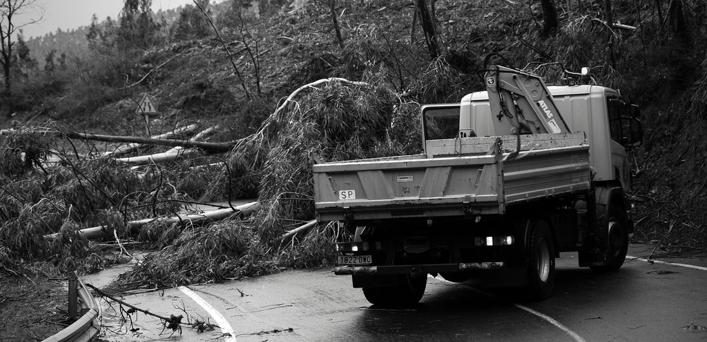 Temporal Euskadi 24-01-09